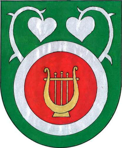 znak, Vysoká u Příbramě, okres Příbram